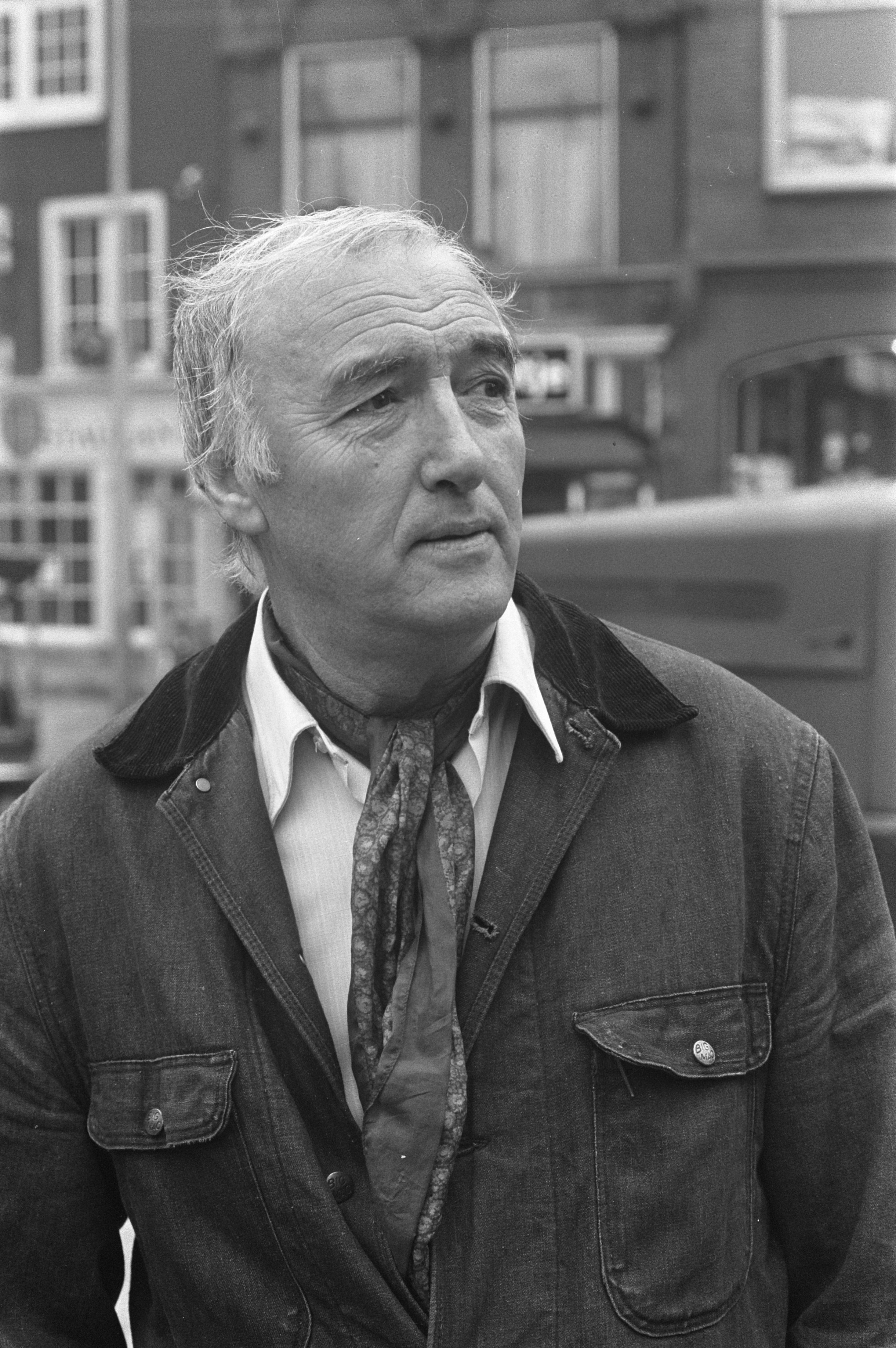 Collectie / Archief : Fotocollectie Anefo Reportage / Serie : [ onbekend ] Beschrijving : Lieverdje terug op Spui, beeldhouwer Kneulman (kop) Datum : 10 oktober 1972 Trefwoorden : beeldhouwers Fotograaf : Punt, […] / Anefo Auteursrechthebbende : Nationaal Archief Materiaalsoort : Negatief (zwart/wit) Nummer archiefinventaris : bekijk toegang 2.24.01.05 Bestanddeelnummer : 925-9407 Reacties Geplaatst door Maaike op 19 juni 2014 - 22:38. Persoonsnamen: Kneulman, Carel Plaats: Amsterdam, Noord-Holland NB. Het Lieverdje werd tijdelijk van zijn sokkel gehaald vanwege ingrijpende wijzigingen aan het Spui o.a. om de trambaan autovrij te maken